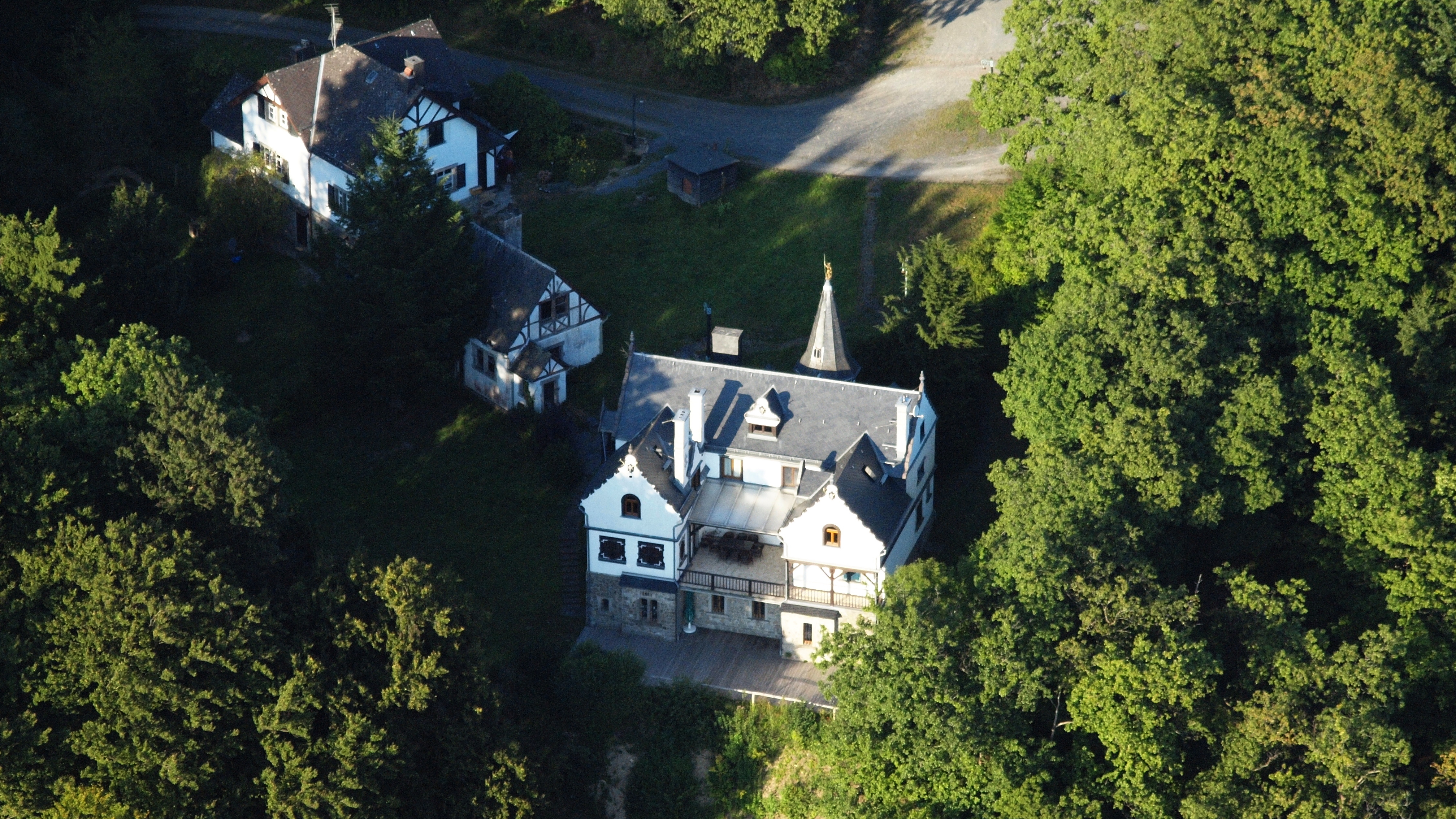 Jagdschloss Sayneck: Luftaufnahme